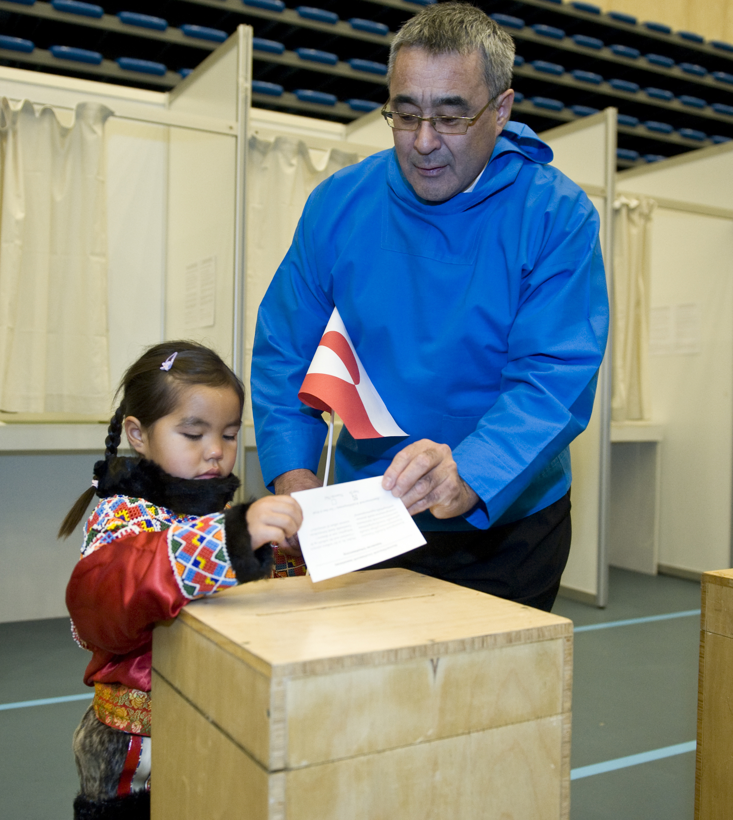 Landsstyreformand Hans Enoksen til Folkeafstemning i Multihallen i Nuuk med Pipaluk Petersen på 5 år.